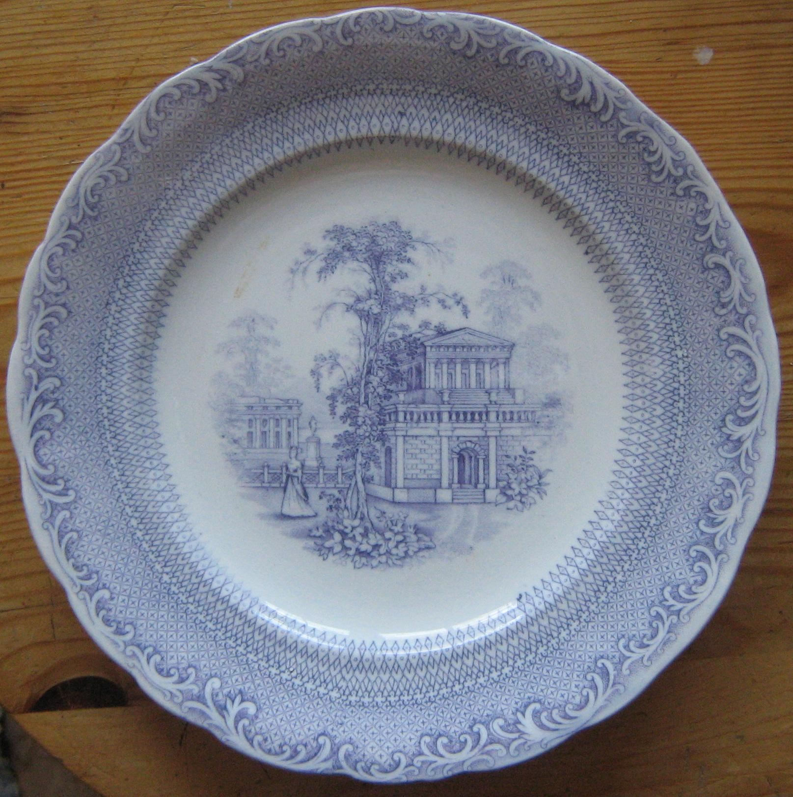 Tallrik i serien spetsmönstret, Rörstrand före 1882.